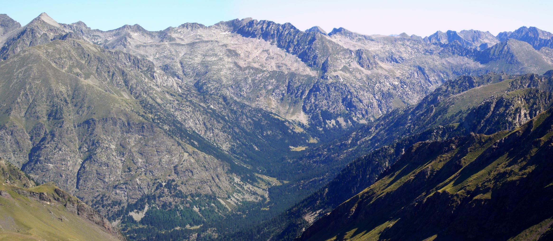 Vall de Contraix vista des del Tuc de Carants; la Vall de Boí, Alta Ribagorça, Catalunya